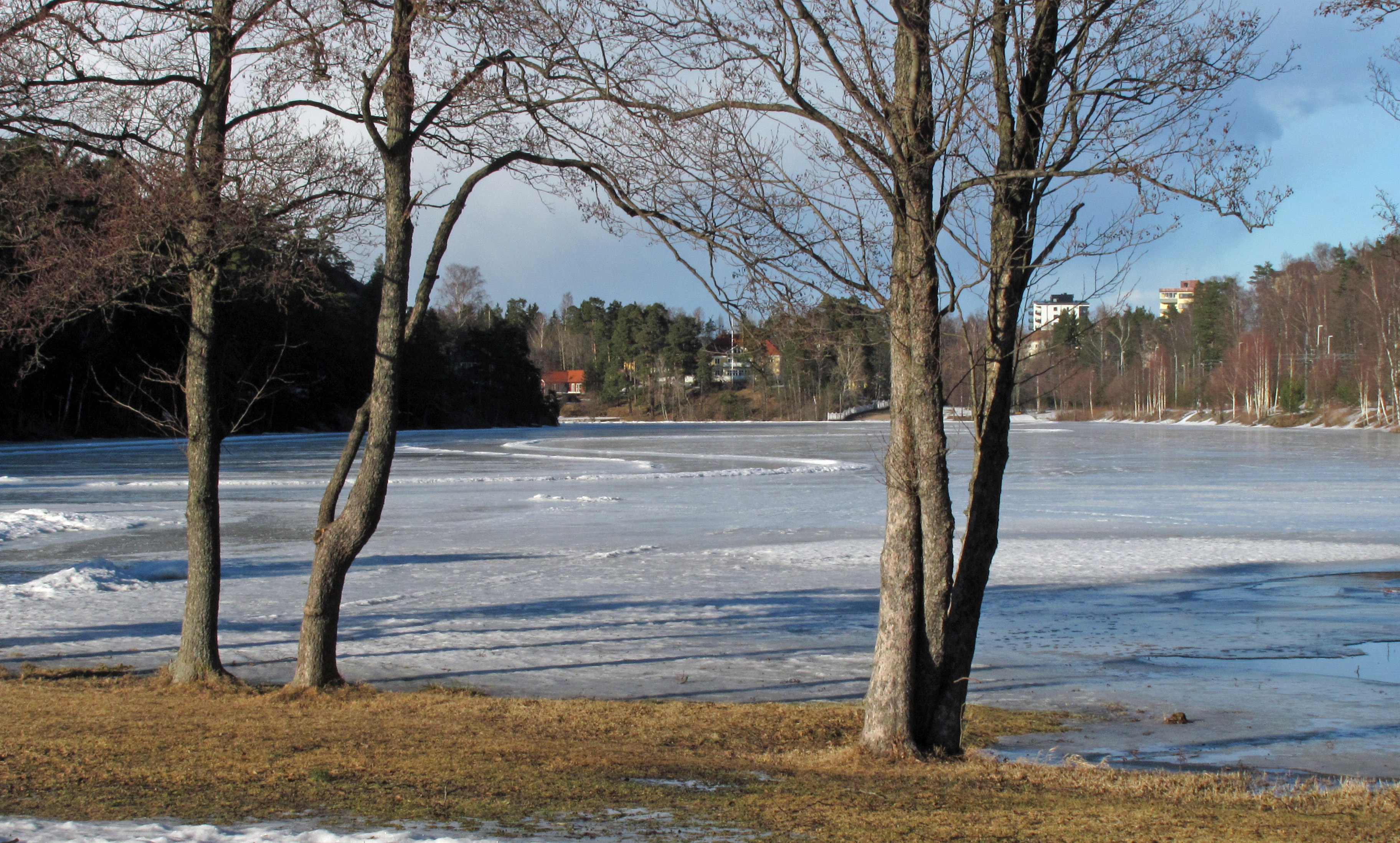 Övre Rudasjön, vy från södra stranden